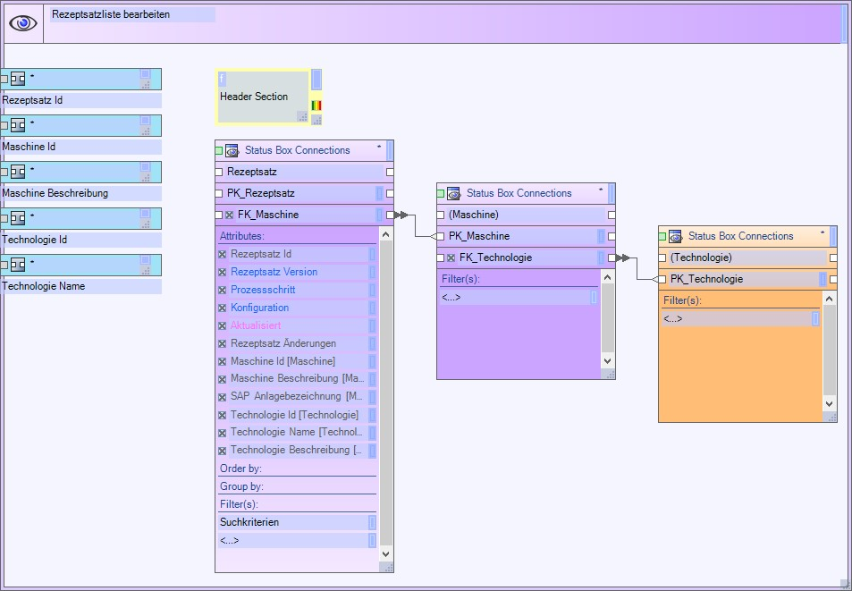 Abfragediagramm aus Posity